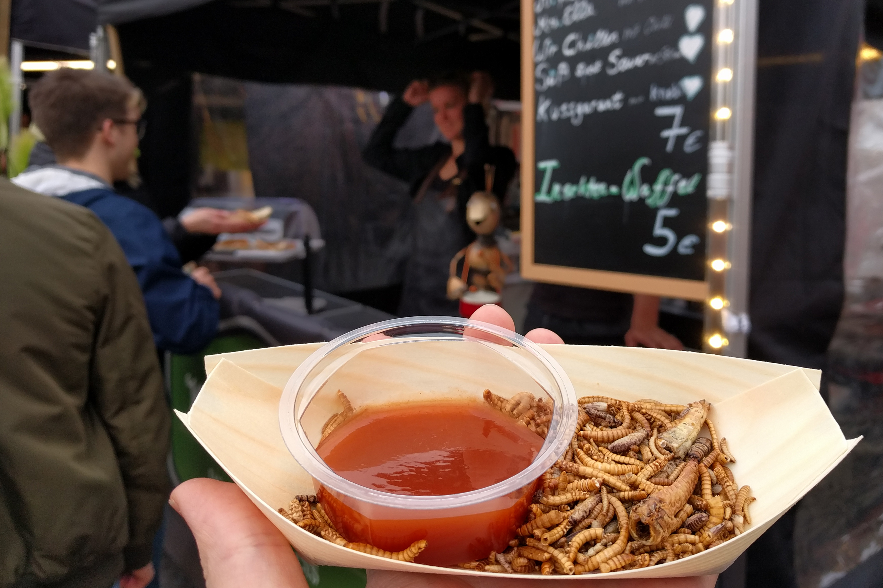 Schale mit ganzen, gerösteten Speiseinsekten (Mehlwürmer, Buffalowürmer, Heuschrecken, Grillen) und Dip auf einem Streetfood-Markt in Deutschland.